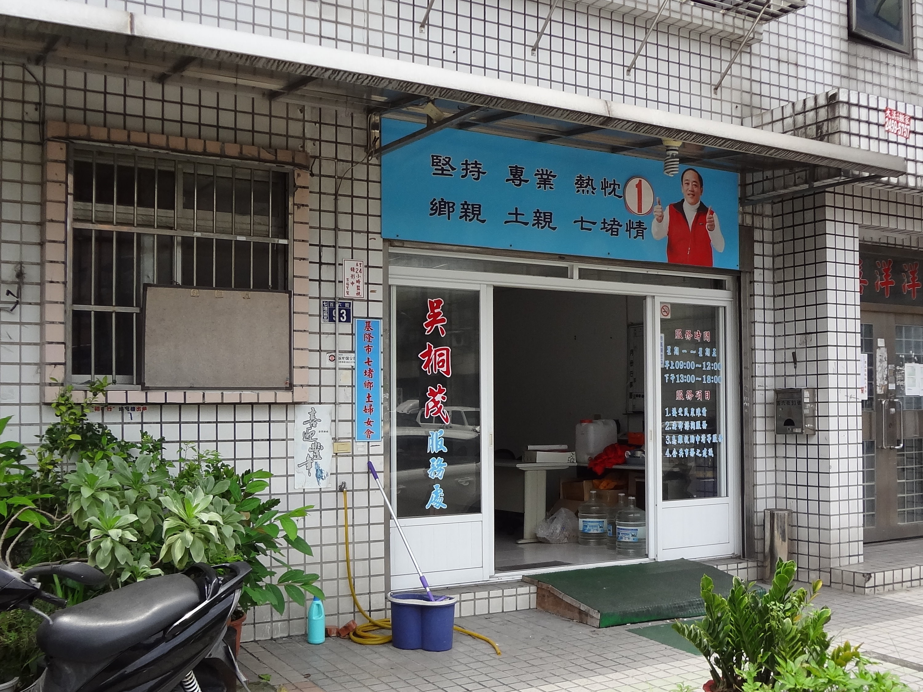 2014年無黨籍基隆市議員參選人吳桐茂服務處，位於基隆市七堵區百六街93號1樓（萬達喜洋洋），2014年2月28日豬哥亮親臨助選。